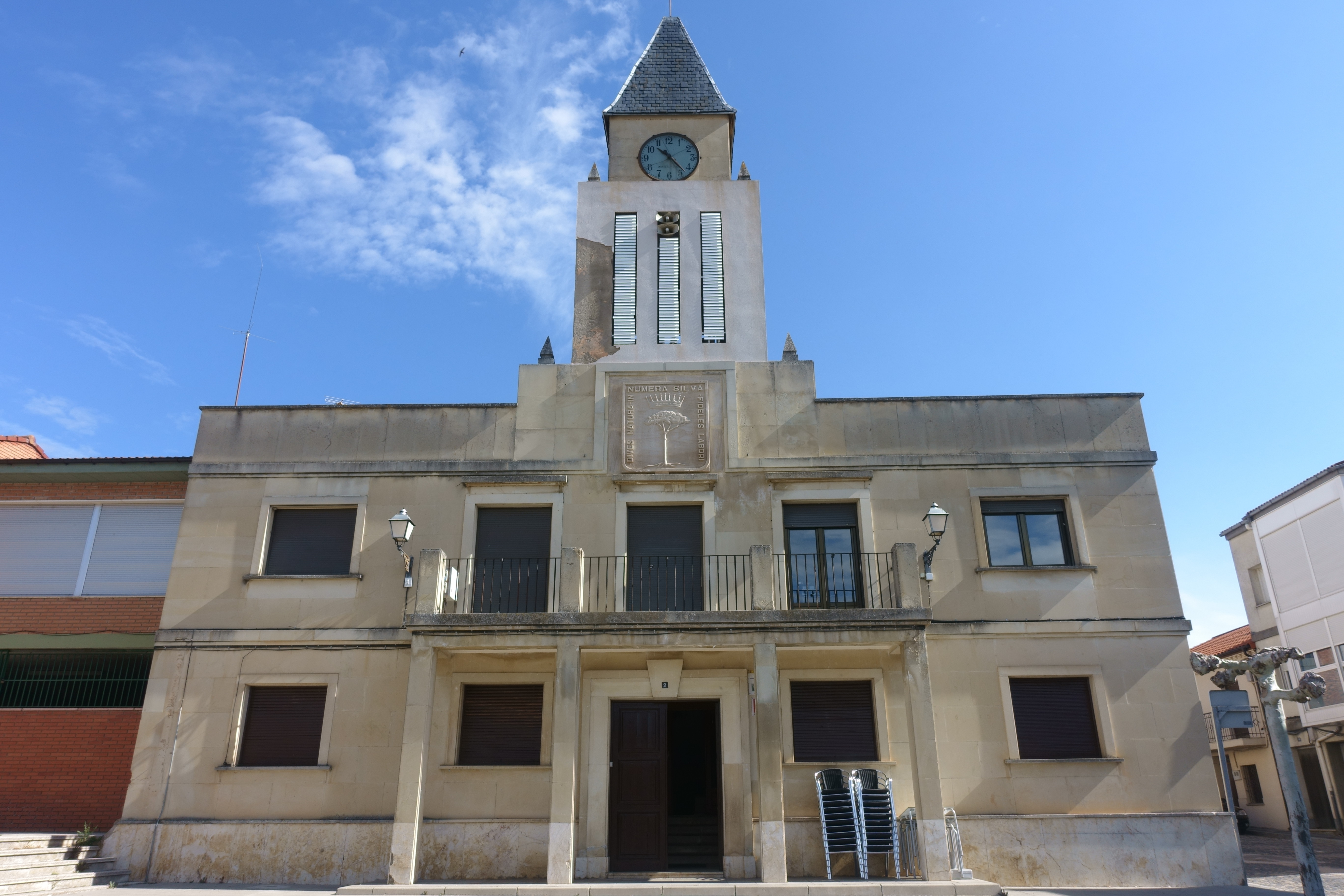 Casa consistorial de Tardelcuende (Soria, España).